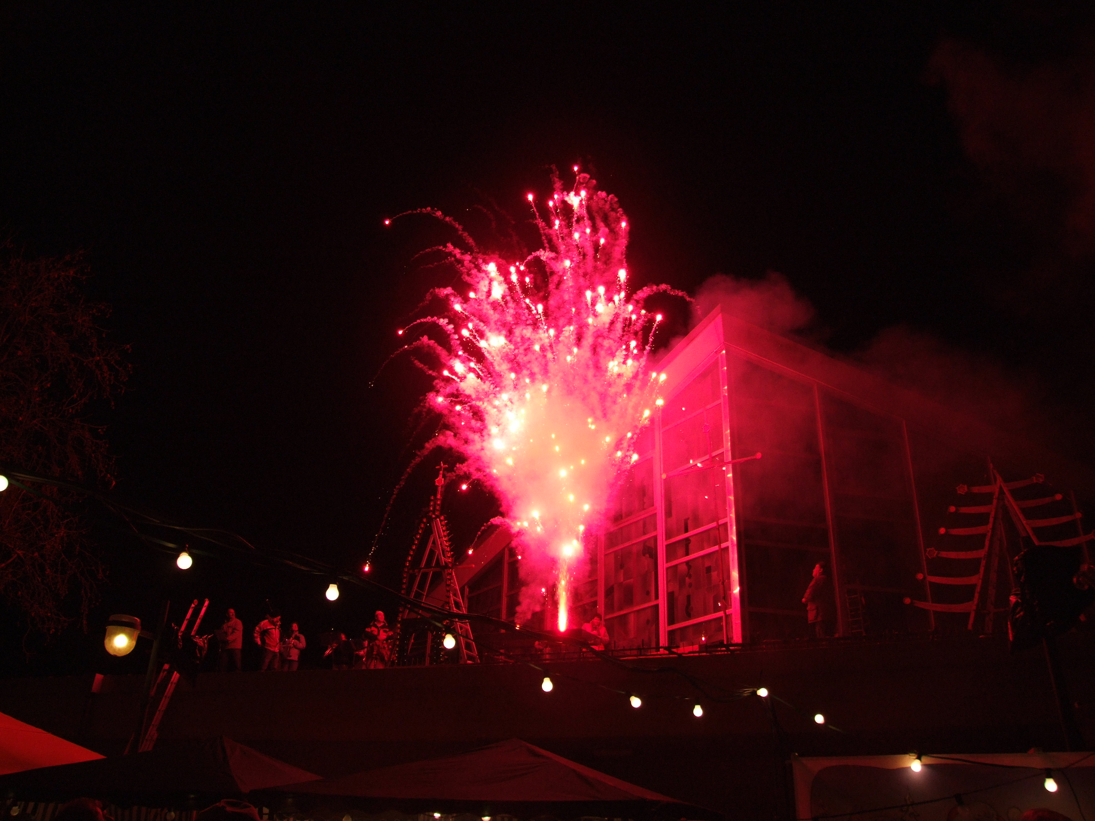 St. Konrad beleuchtet vom Feuerwerk Weihnachtsmarkt Speyer-Nord